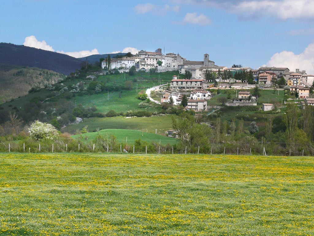 Monteleone di Spoleto, view